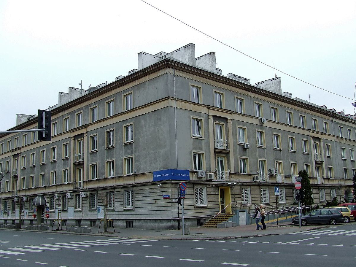 Mokotów district administration building, Rakowiecka street corner Wiśniowa Street